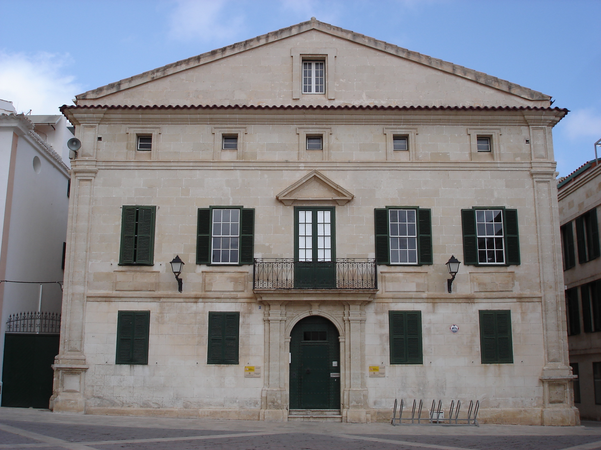 Biblioteca de Maó